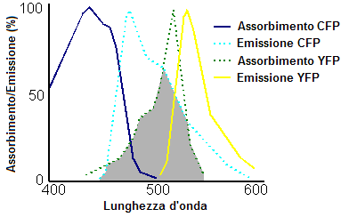 Spettro di due fluorocromi durante FRET